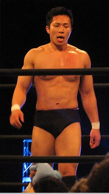 2015年3月22日 ベイコム総合体育館「Road to INVASION ATTACK 2015」小松洋平